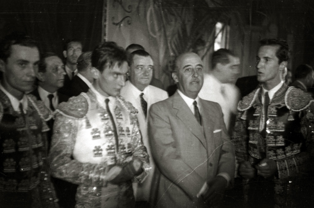 Título original: Corrida de toros en la plaza de 'El Txofre' (77/79) Localización: San Sebastián (Guipúzcoa)